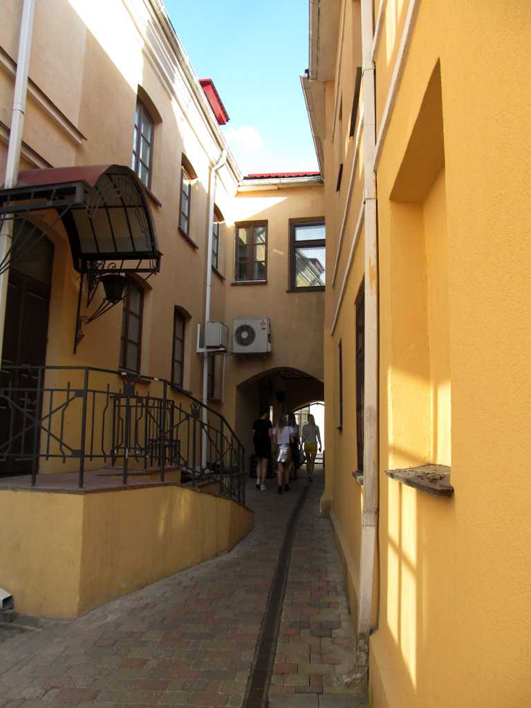 Мінск. Вуліца Рэвалюцыйная, 14